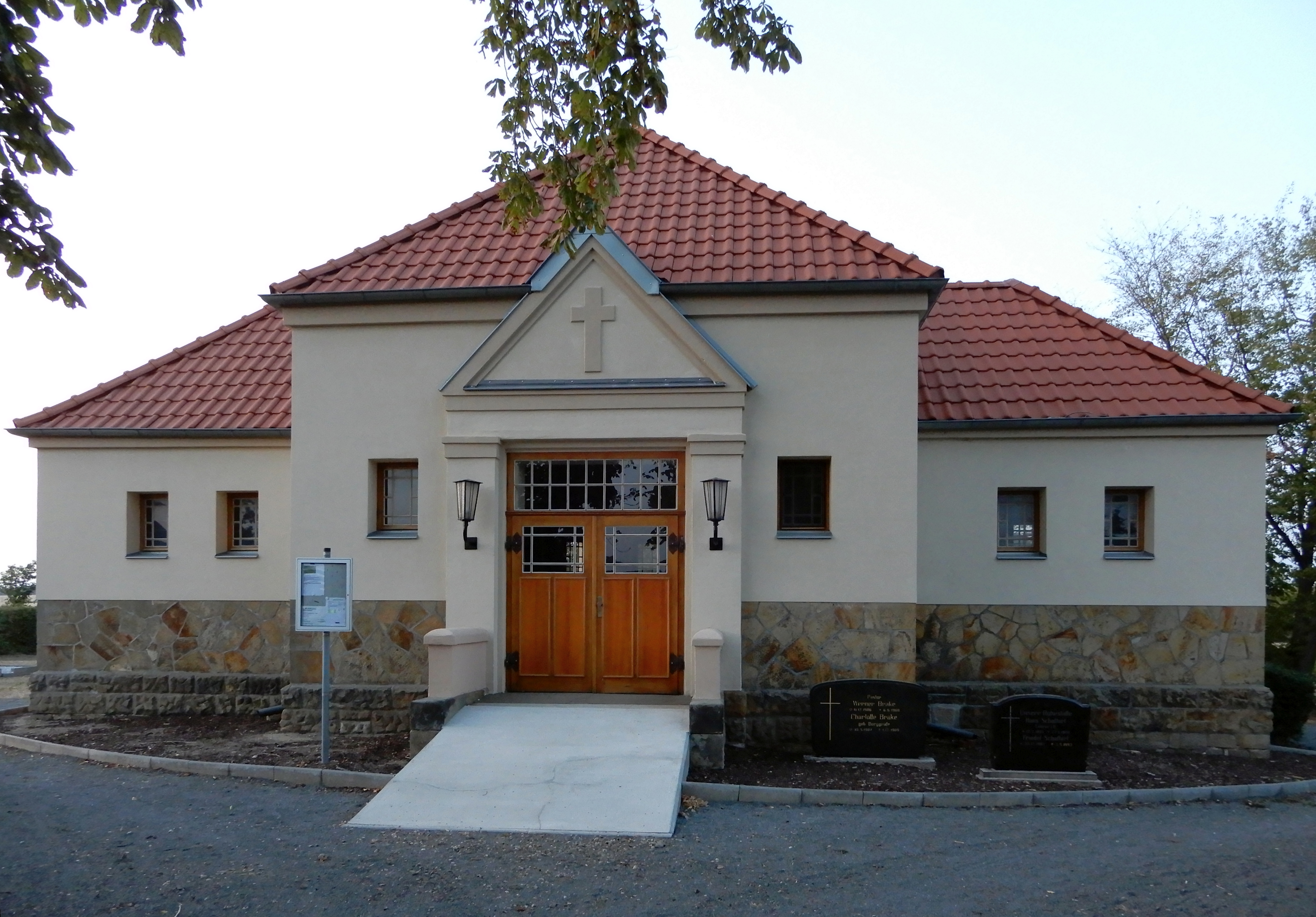 Feierhalle auf dem Friedhof Weddersleben